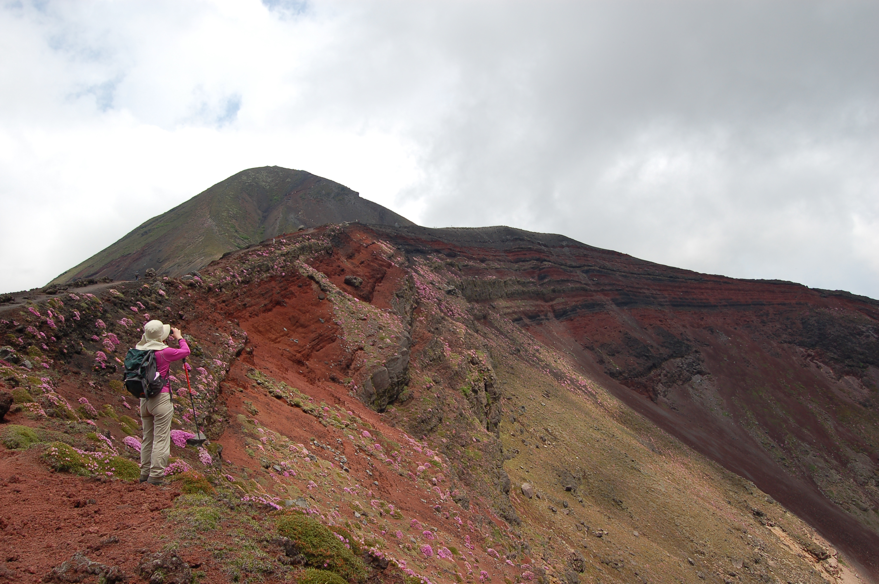 左奥に見えるのが高千穂峰頂上。